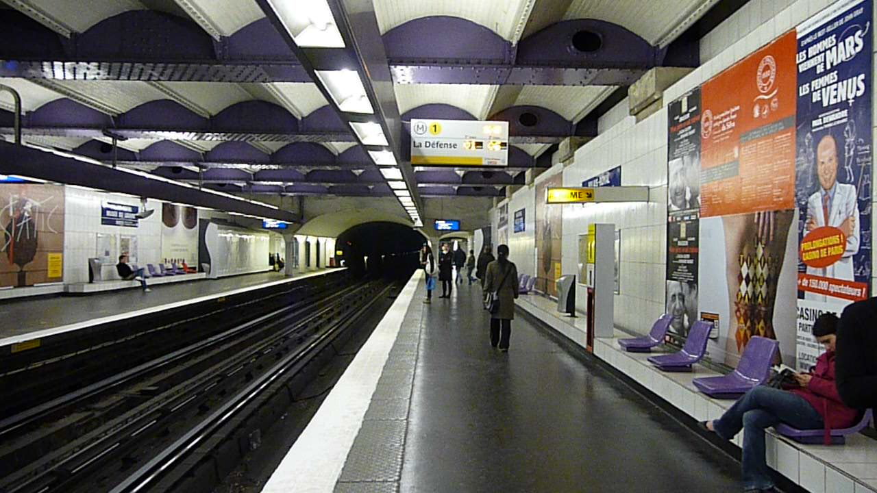 Station Palais Royal - Musée du Louvre, ligne 1 du métro de Paris, France.